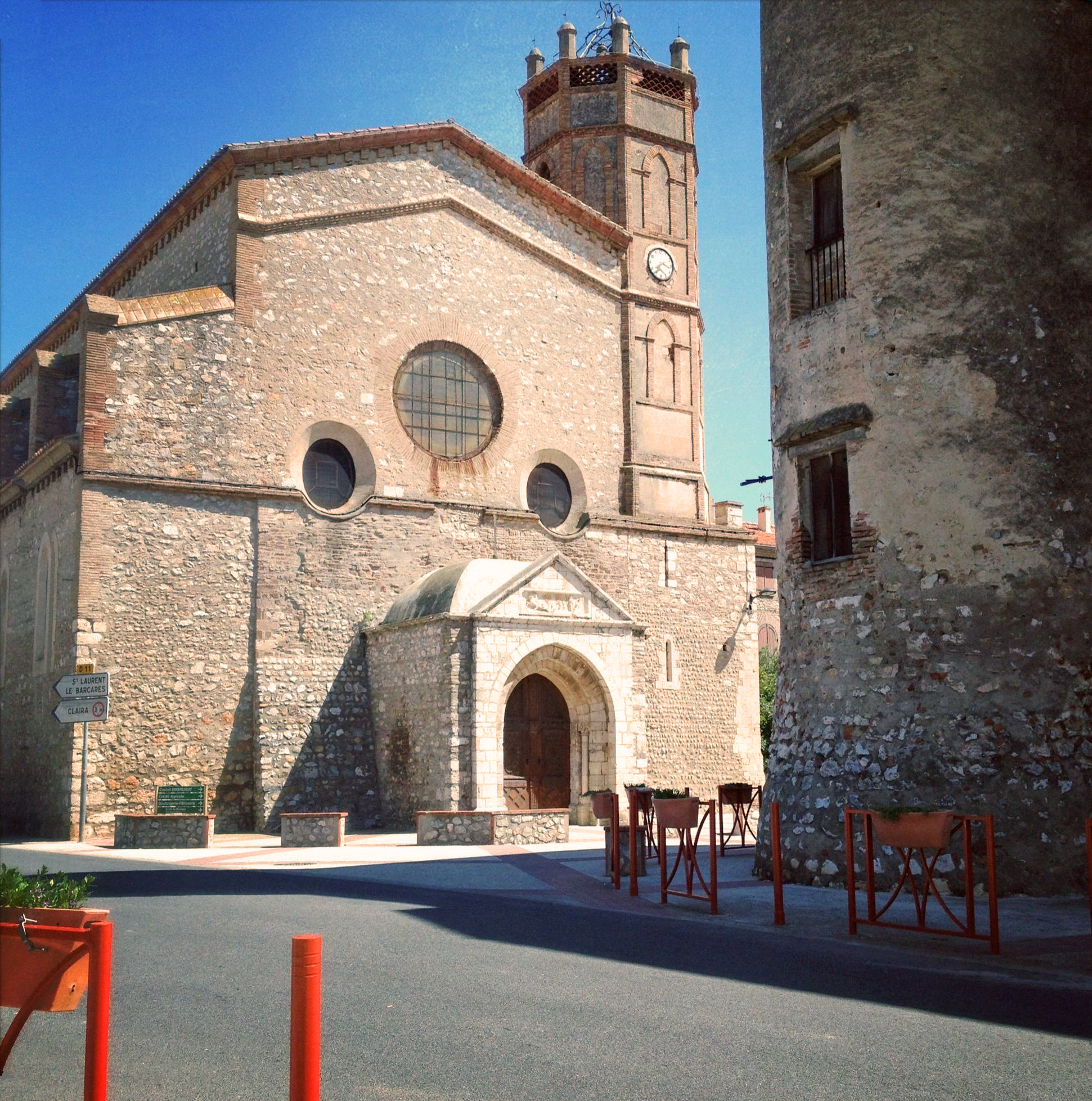 Eglise de Saint Hippolyte dans les Pyrénées Orientales